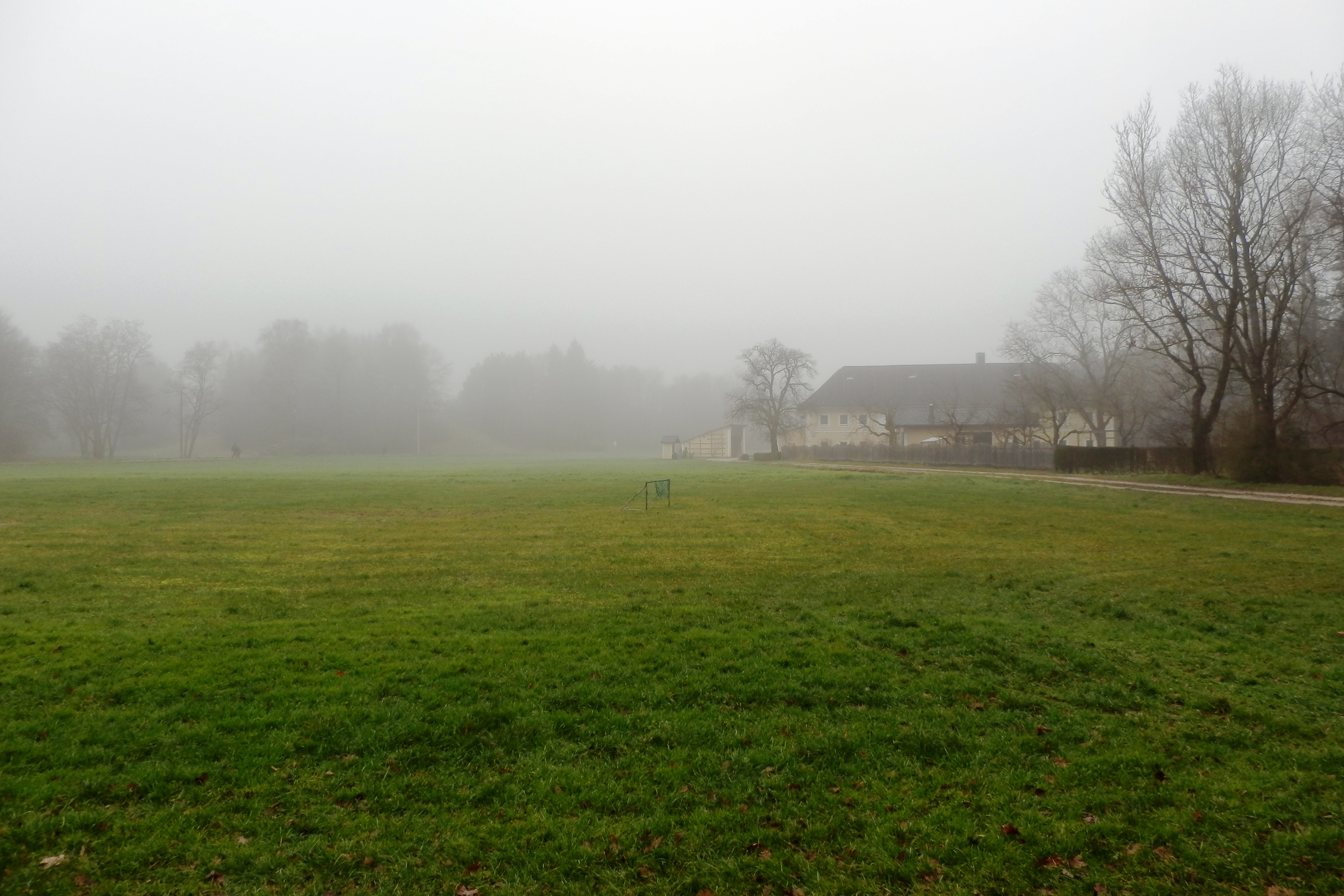 Bauernhof im Wasserwald, Brunnenfeldstraße, Linz